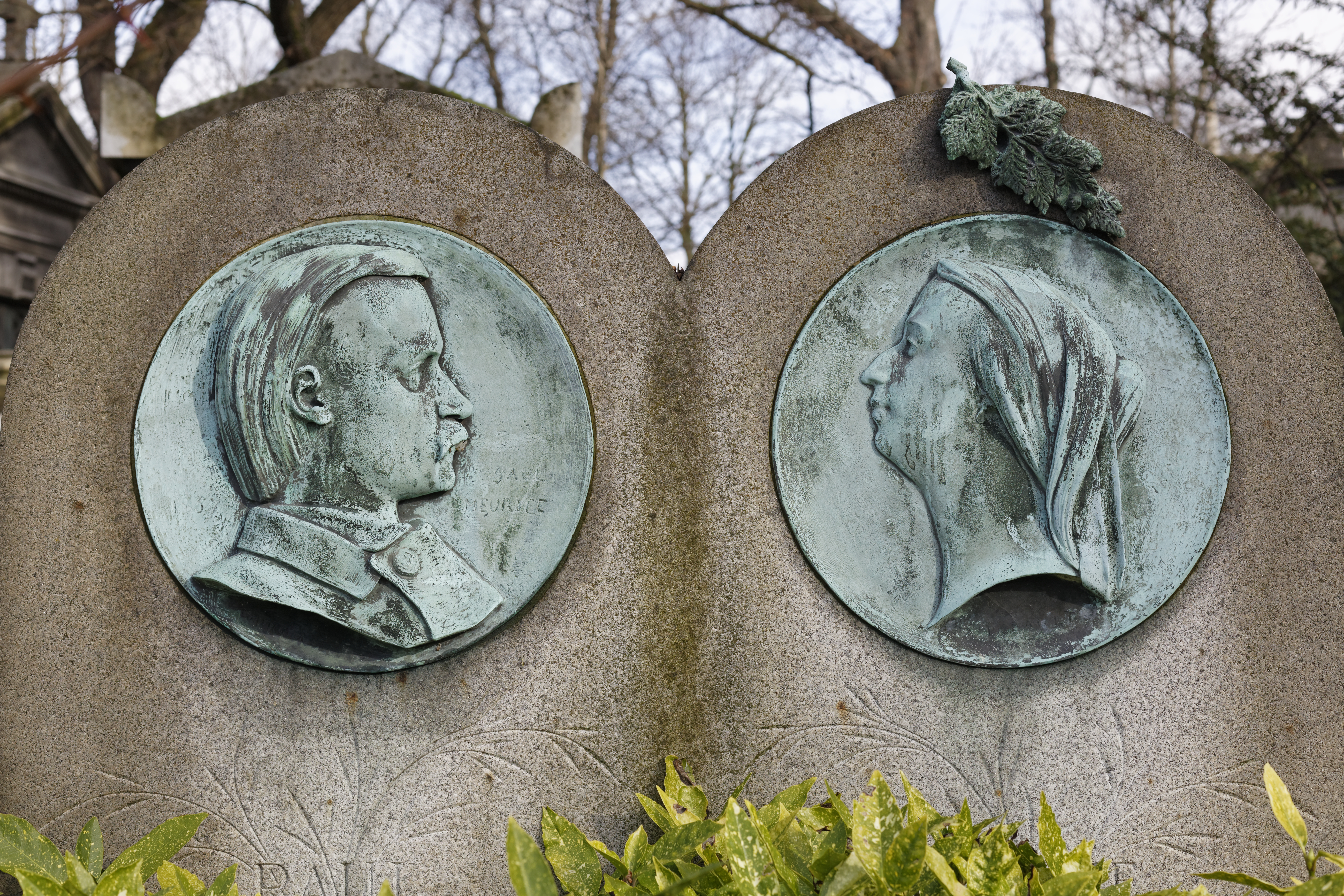 Médaillons